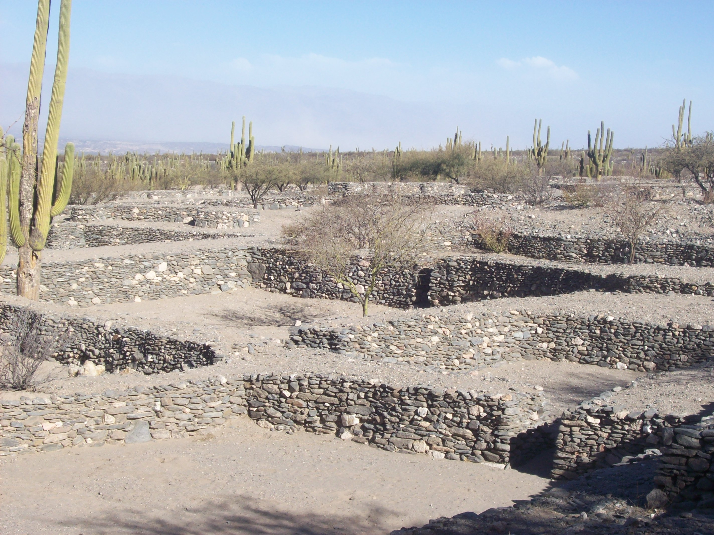 Ruinas de Quilmes al oeste de la provincia de Tucumán, Argentina.